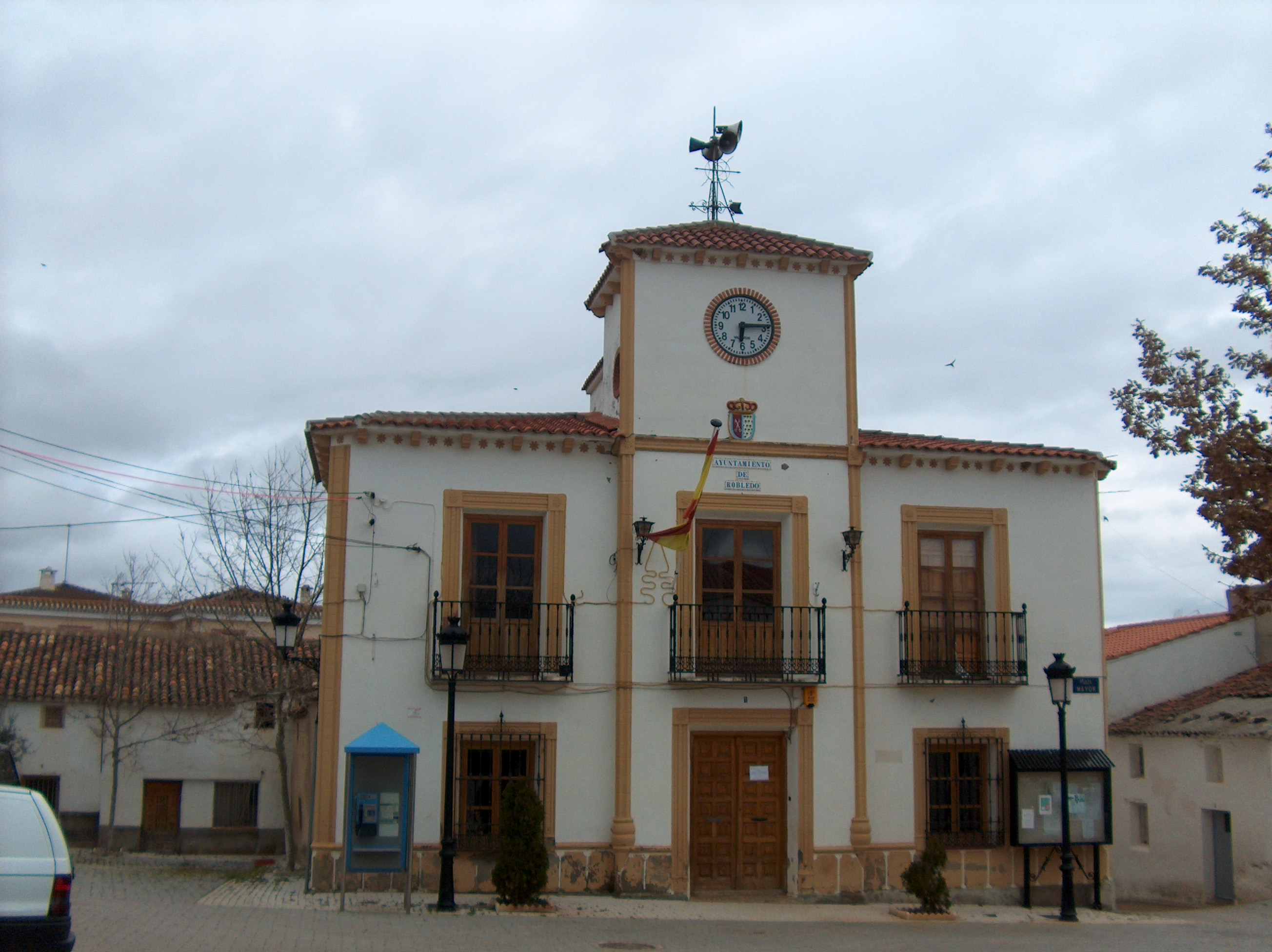 Fotografía propia Ayuntamiento de Robledo